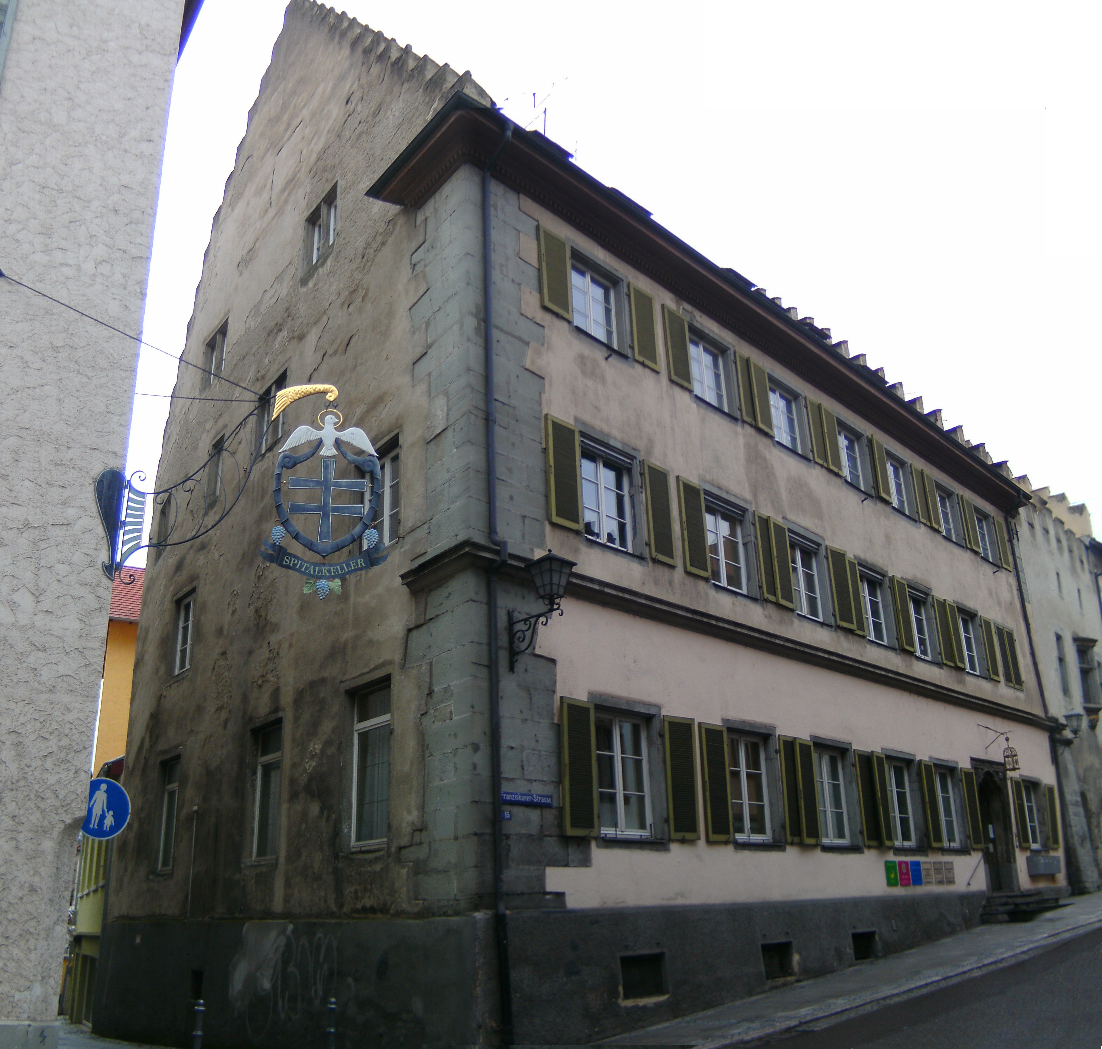 Salmansweiler Hof